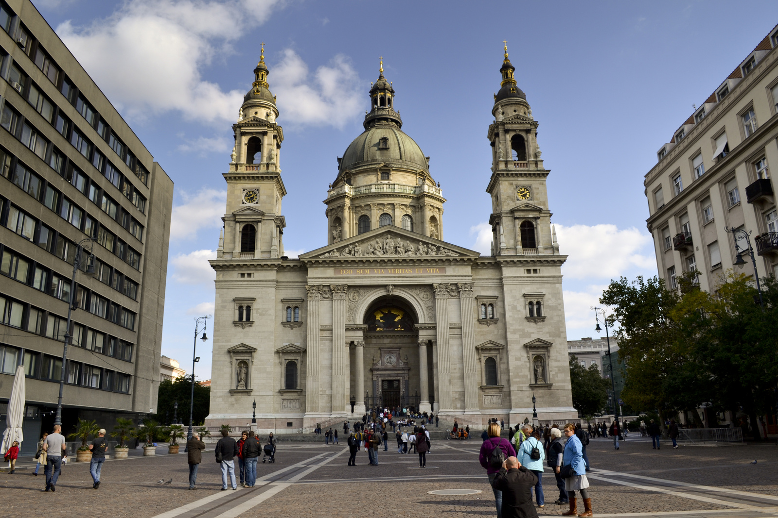 Bazilika (Budapest 5, Szent István tér) This is a photo of a monument in Hungary. Identifier: 615